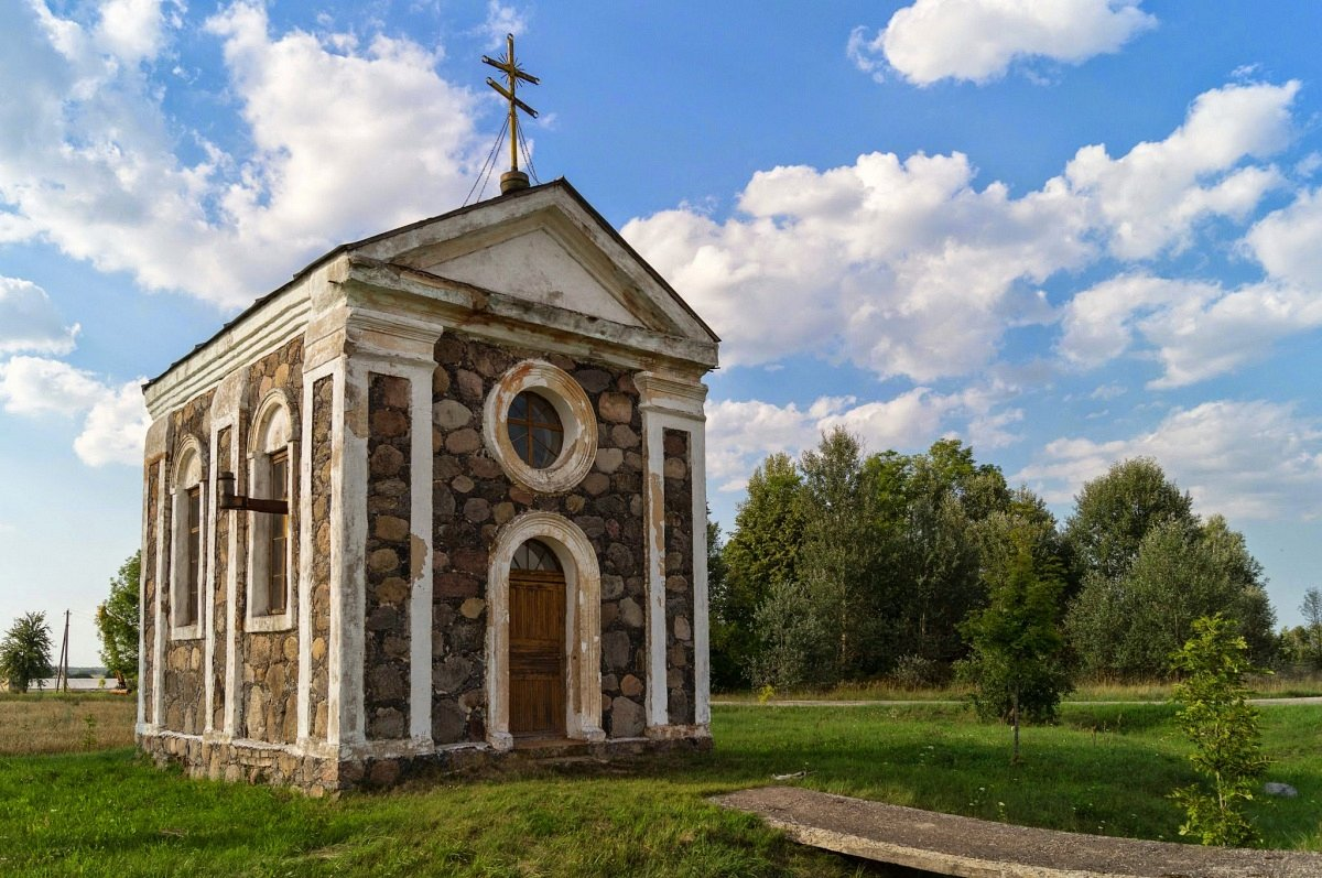 Клесіна. Капліца